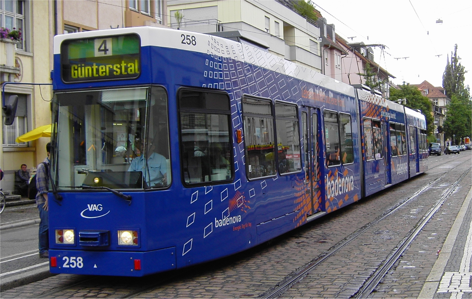 Beschreibung: Straßenbahn Typ GT8Z der VAG Freiburg Quelle: selbst aufgenommen Fotograf: CrazyD, 7. Juli 2005 Lizenzstatus: GNU FDL Description: Tram Typ GT8Z Source: photo was taken by my self Photographer: CrazyD, 7 july 2005 Licence: GNU FDL